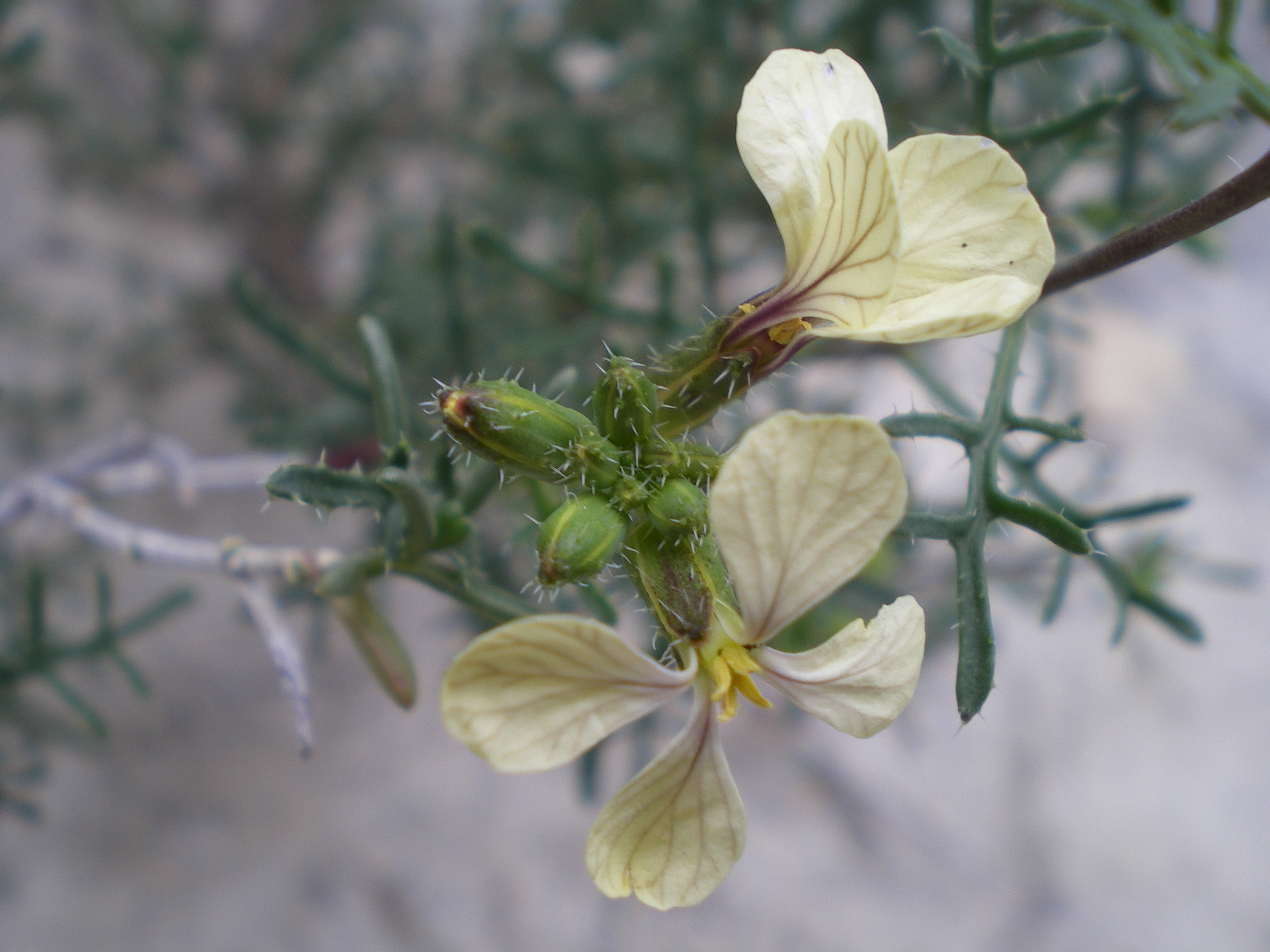 Detalle de flor y capullos de Euzomodendron bourgeanum, endemismo almeriense del subdesierto de Tabernas, España.